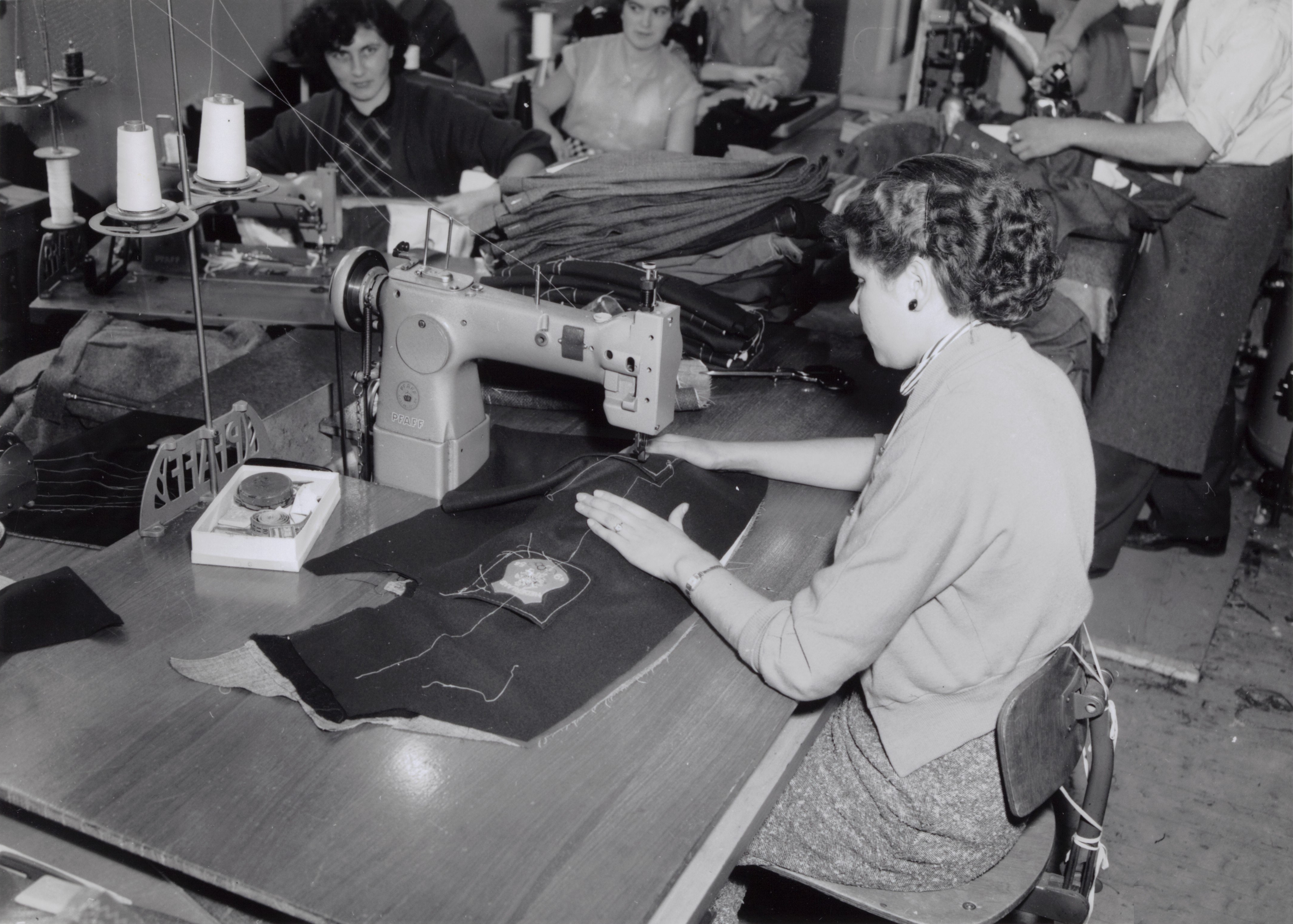 Collectie / Archief : Fotocollectiie Afdrukken ANEFO Rousel Reportage / Serie : Serie Afdrukken ANEFO [RVD Eigen zonder caption] Beschrijving : Collectie Fotocollectiie Afdrukken ANEFO Rousel, fotonummer 157-0979 Annotatie : Zie 90 Datum : 1956 Fotograaf : Afdruk zonder naam fotograaf / Anefo Auteursrechthebbende : Nationaal Archief Materiaalsoort : Foto (zwart/wit) Nummer archiefinventaris : bekijk toegang 2.24.10.02 Bestanddeelnummer : 157-0979